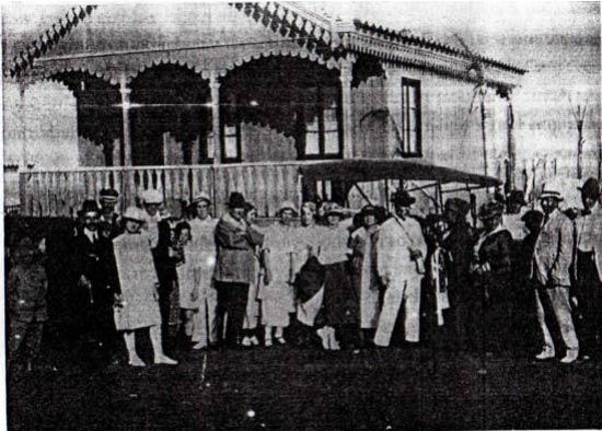 Casa de Protásio Alves em Torres, anos 20